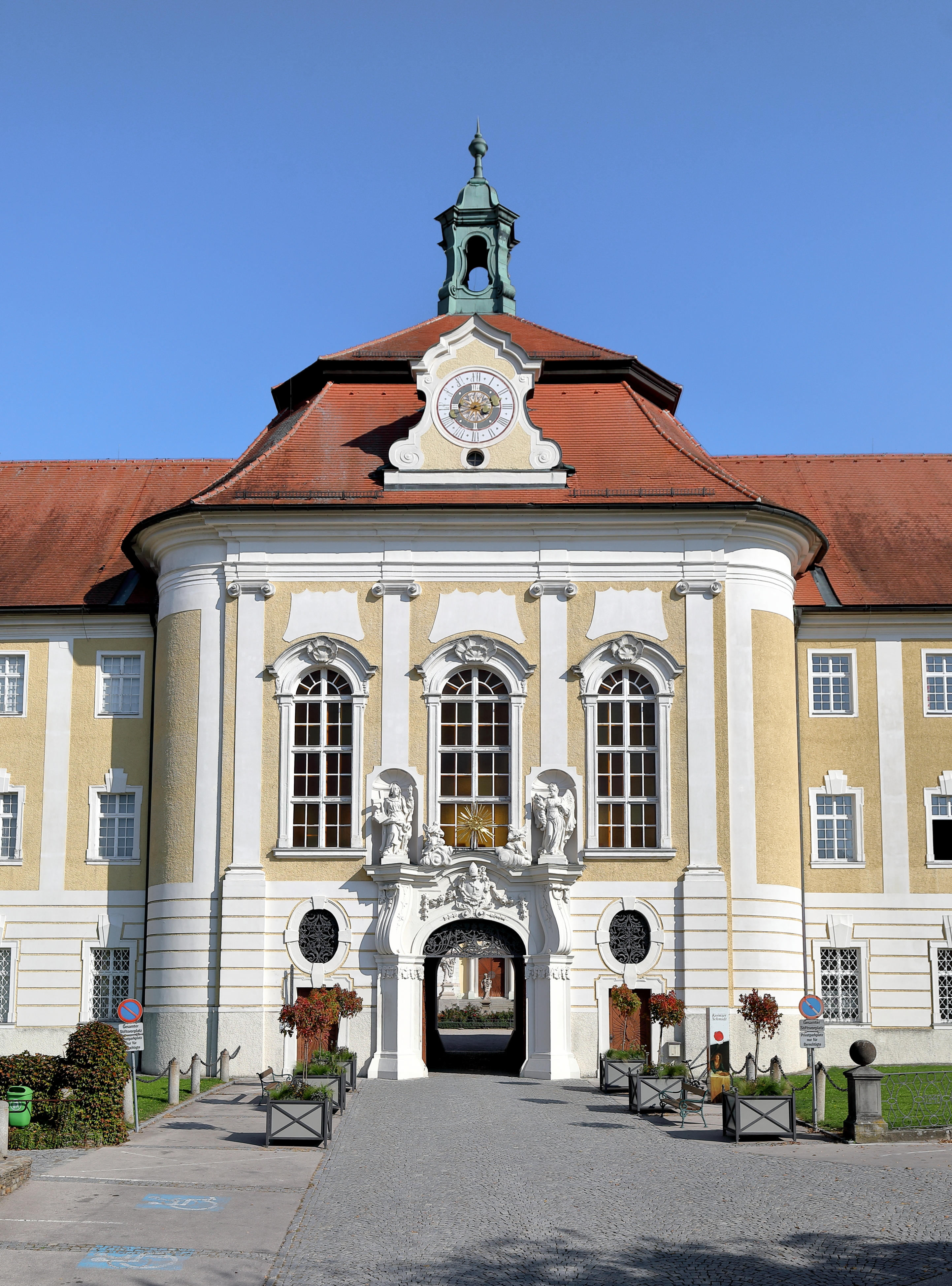 Hauptportal des Benediktinerstiftes in der niederösterreichischen Marktgemeinde Seitenstetten.Das Stift ging aus einer Stiftung aus dem Jahr 1112 hervor. Die Klosteranlage wurde zwischen 1718 und 1747 zu einem 160 Meter langen „Vierkanter Gottes“ aus- und umgebaut, wobei die älteren, von der Spätromanik bis zum Frühbarock entstandenen Teile (Stiftskirche, Kreuzgang, Ritterkapelle etc.) von der mächtigen barocken Anlage umfangen bzw. in dieser aufgegangen sind. Verantwortlich für den Um- und Ausbau war der Barockbaumeister Joseph Munggenast und nach dessen Tod im Jahr 1741 führte Johann Gotthard Hayberger die Arbeiten zu Ende.